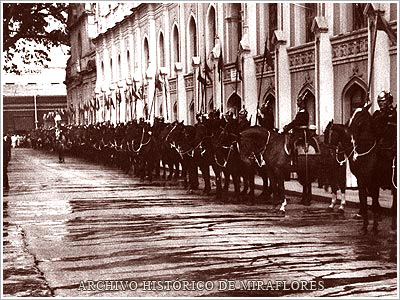 Parada Militar frente Palacio de Las Academias. Antigua UCV. Año (1945-1948)